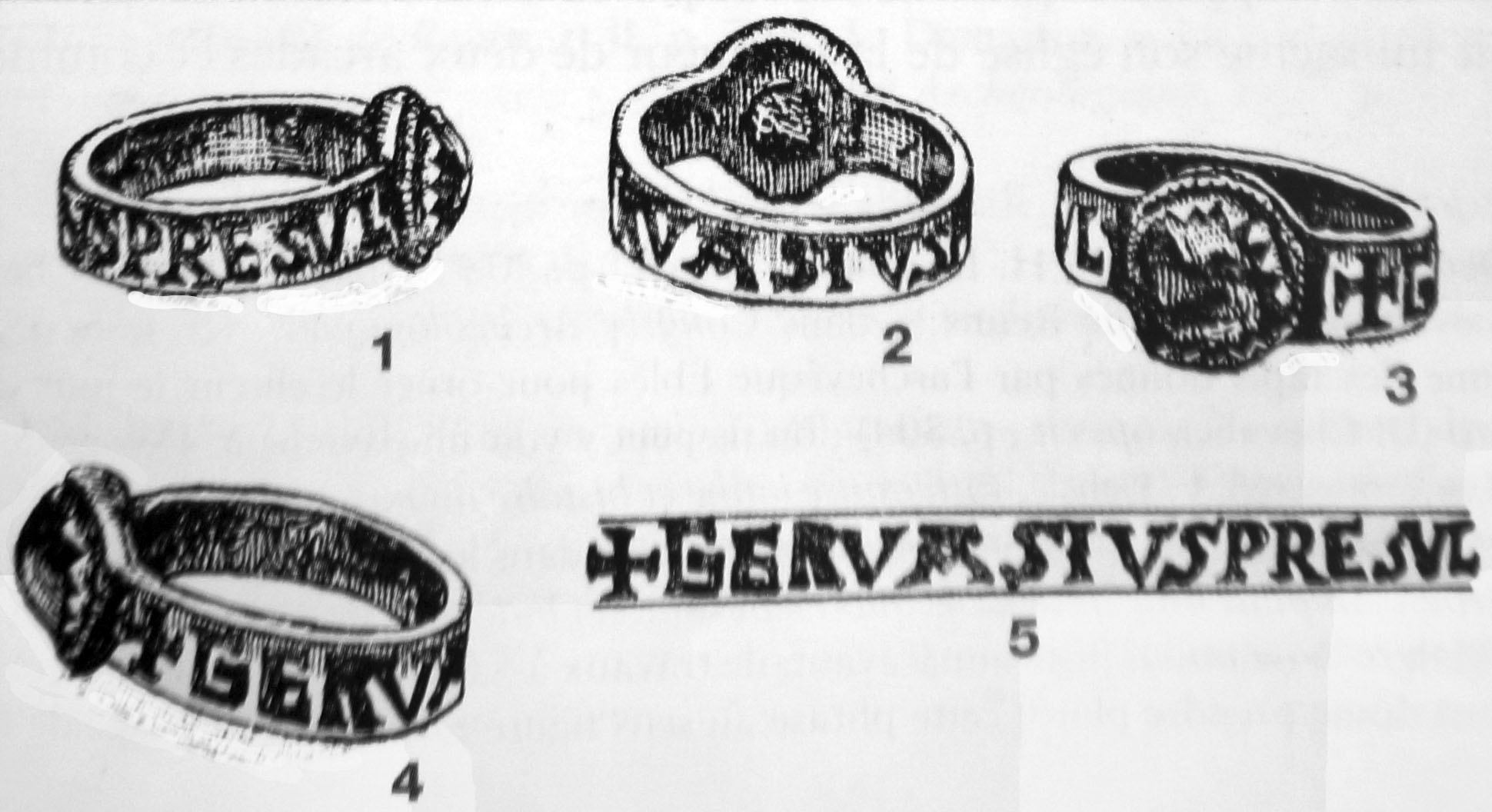 Relevé de l'anneau d'évêque de Gervais de Château Loir.